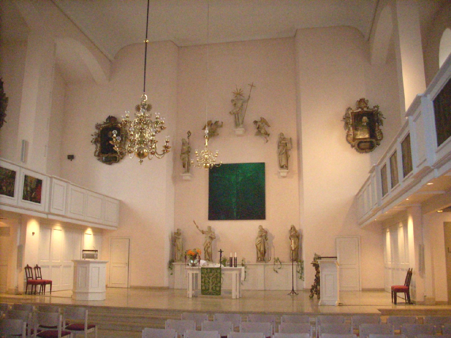 Neustädter Kirche Hannover, Interior